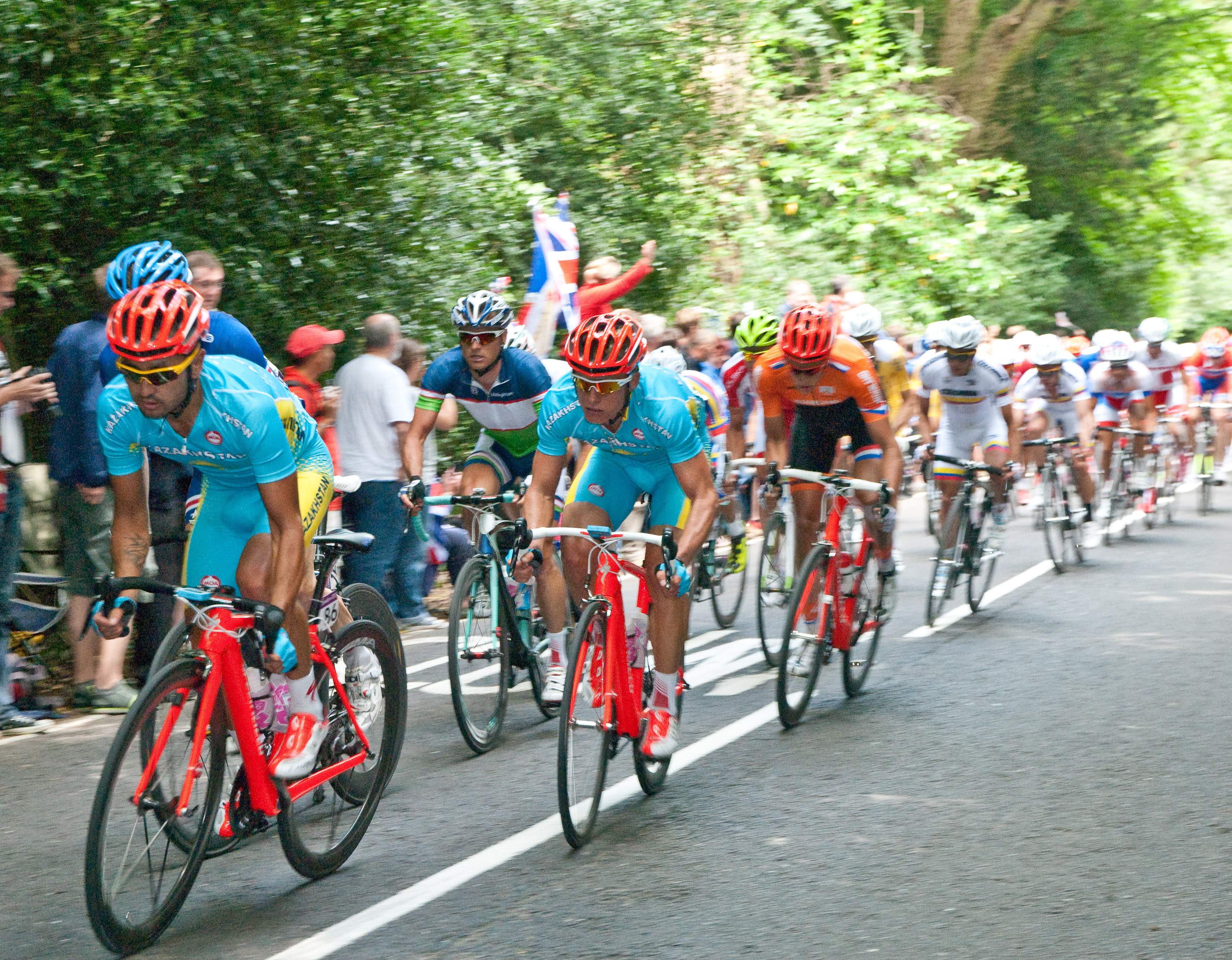 Alexander Vinokourov